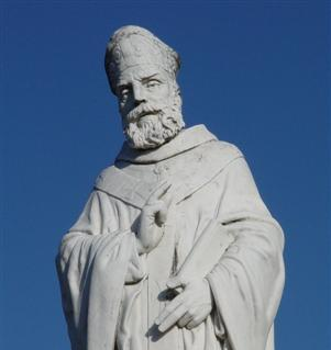 São Maartinho de Braga, detalhe da estátua